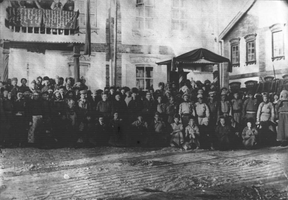 Монгол: Анхдугаар үндсэн хуулийг хэлэлцэн батласан Улсын анхдугаар их хурал. 1924 оны 11 дүгээр сар.